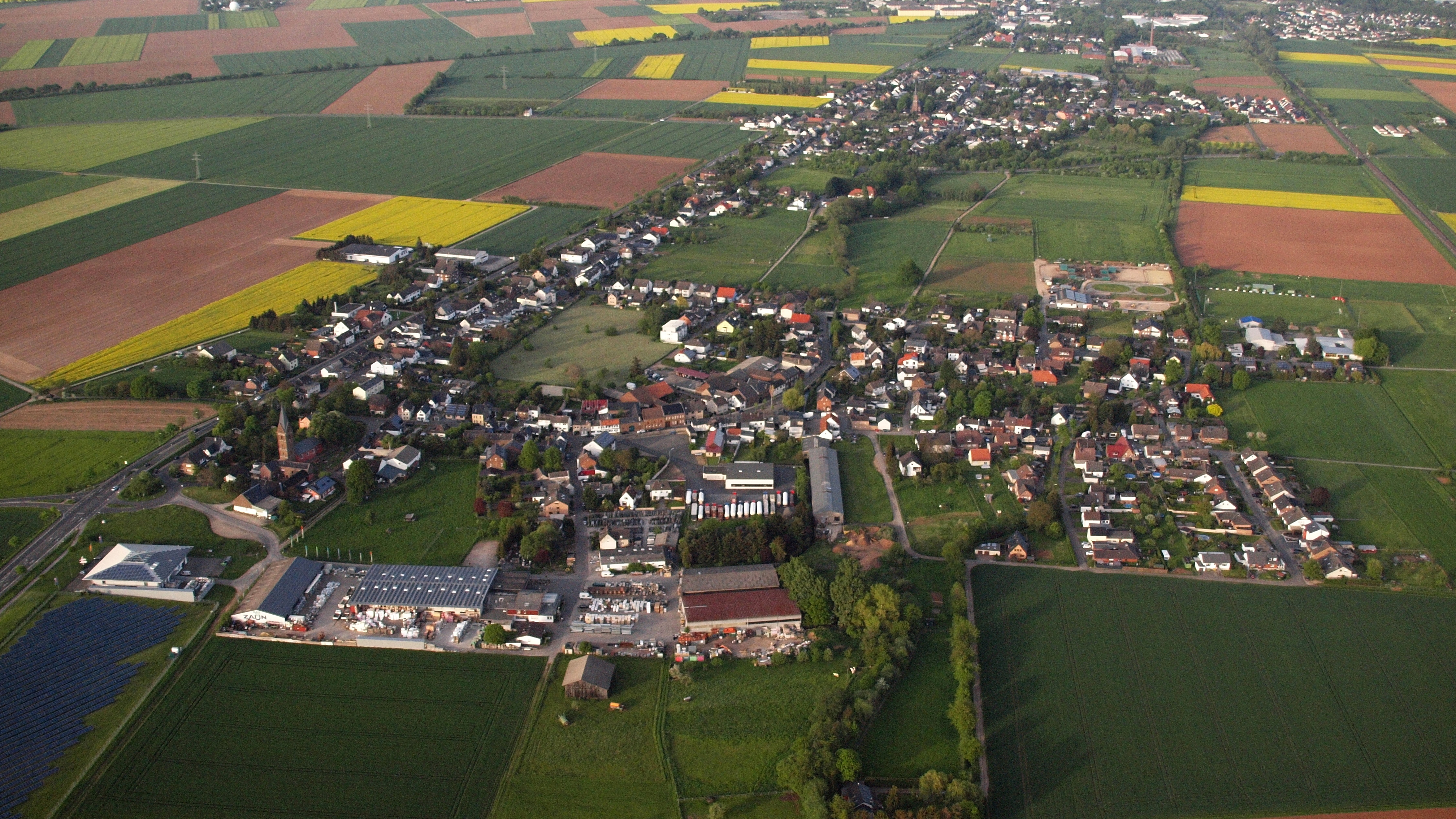 Wißkirchen, Luftaufnahme (2015)